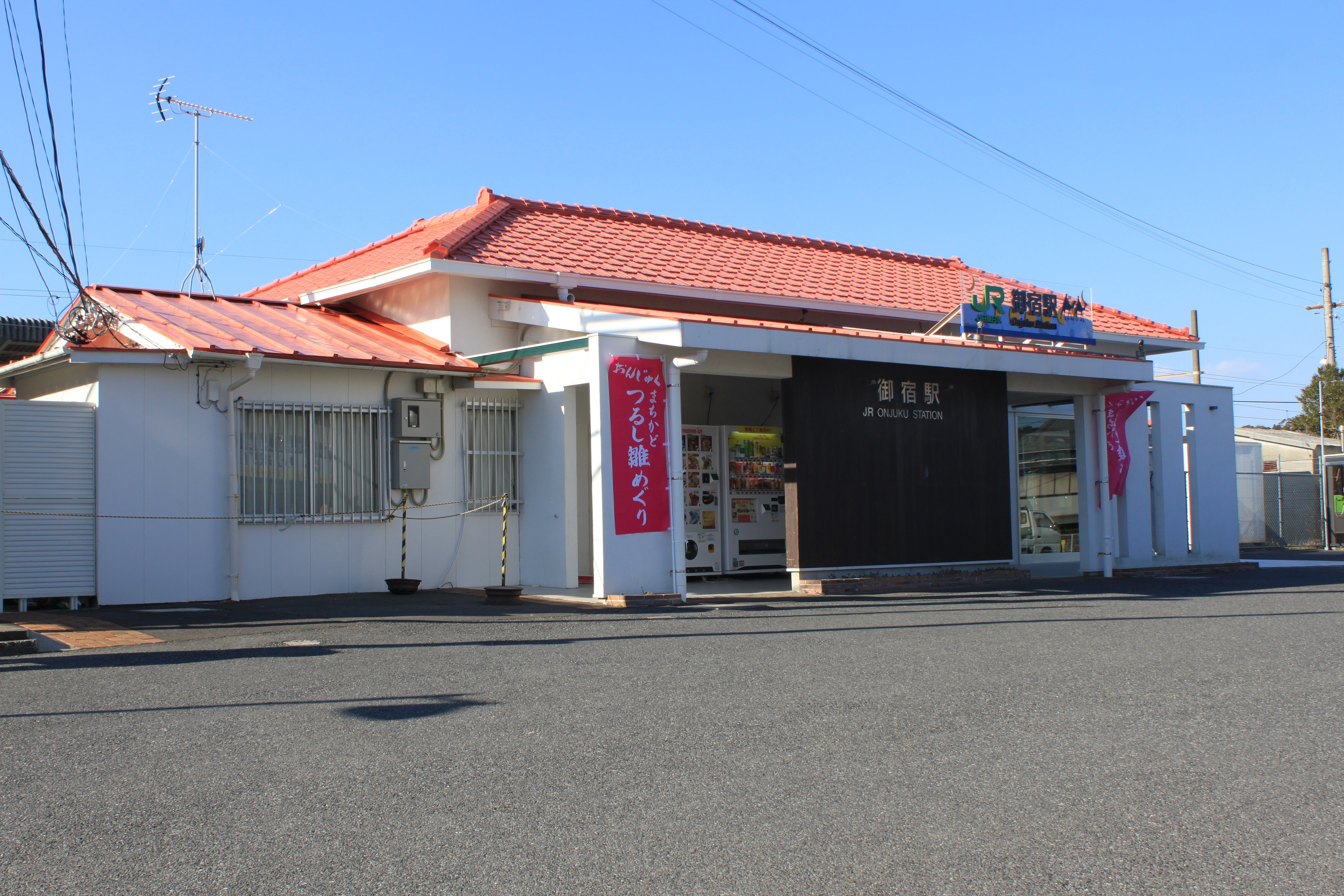 御宿駅